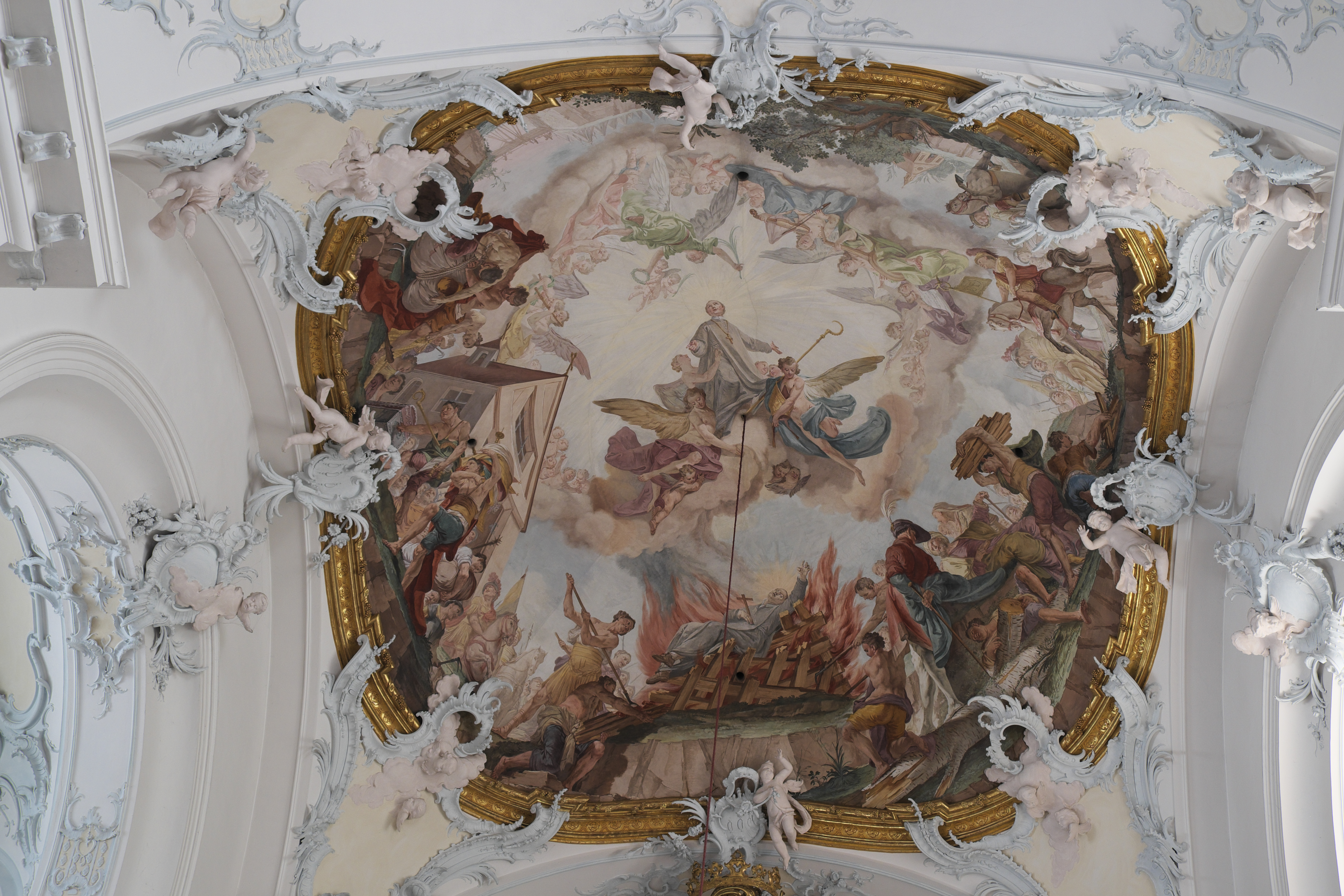 Katholische Pfarrkirche St. Marinus und Anianus, ehemalige Abteikirche des Benediktinerklosters Rott in Rott am Inn im Landkreis Rosenheim (Bayern/Deutschland), Deckenfresken von Matthäus Günther, von 1763; Darstellung: Tod des heiligen Marinus (Wilparting), er wird von Räubern ermordet und verbrannt